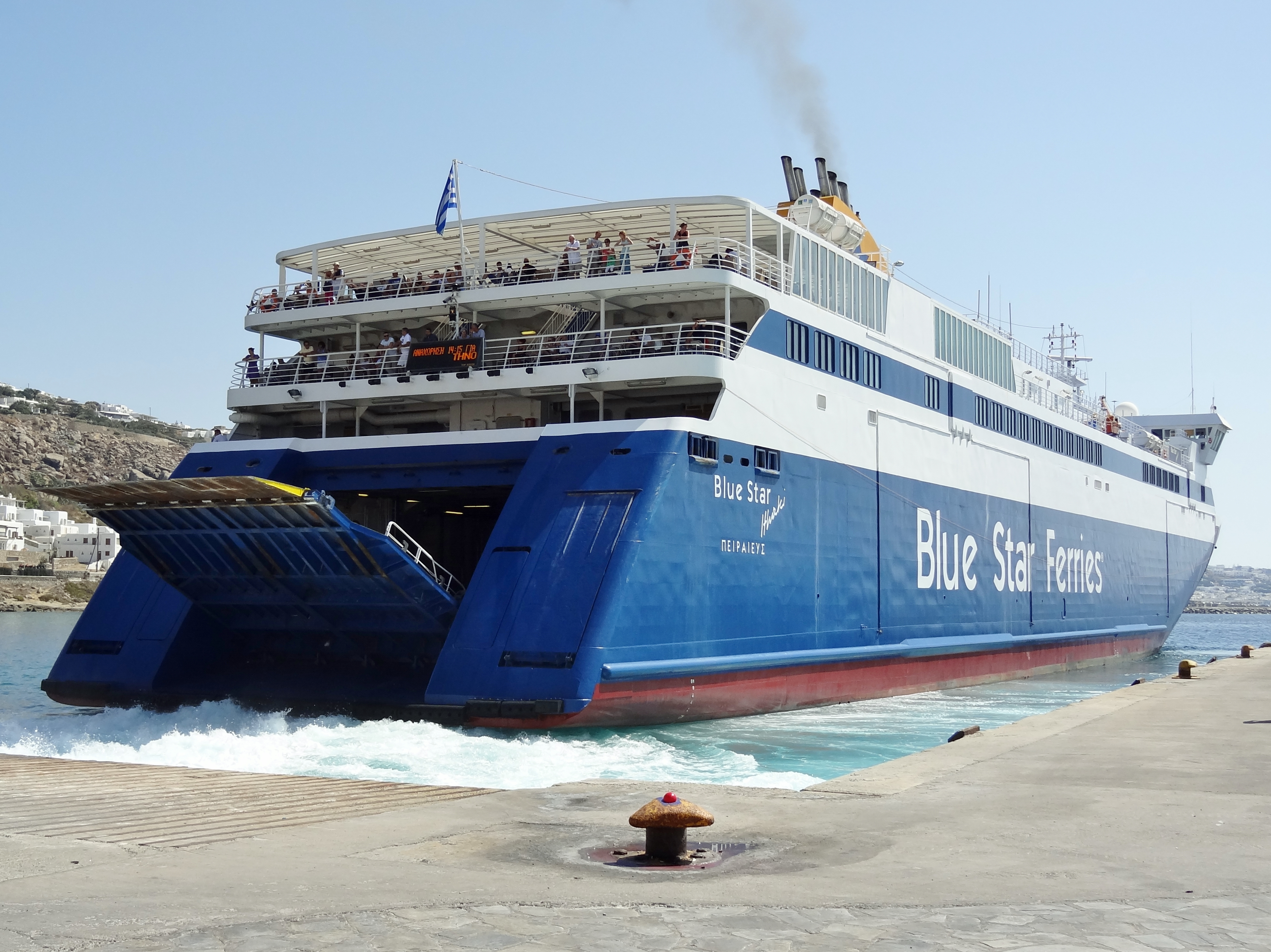 Fähre Ithaki der Gesellschaft Blue Star Ferries im Hafen von Tourlos auf Mykonos, Kykladen, Griechenland